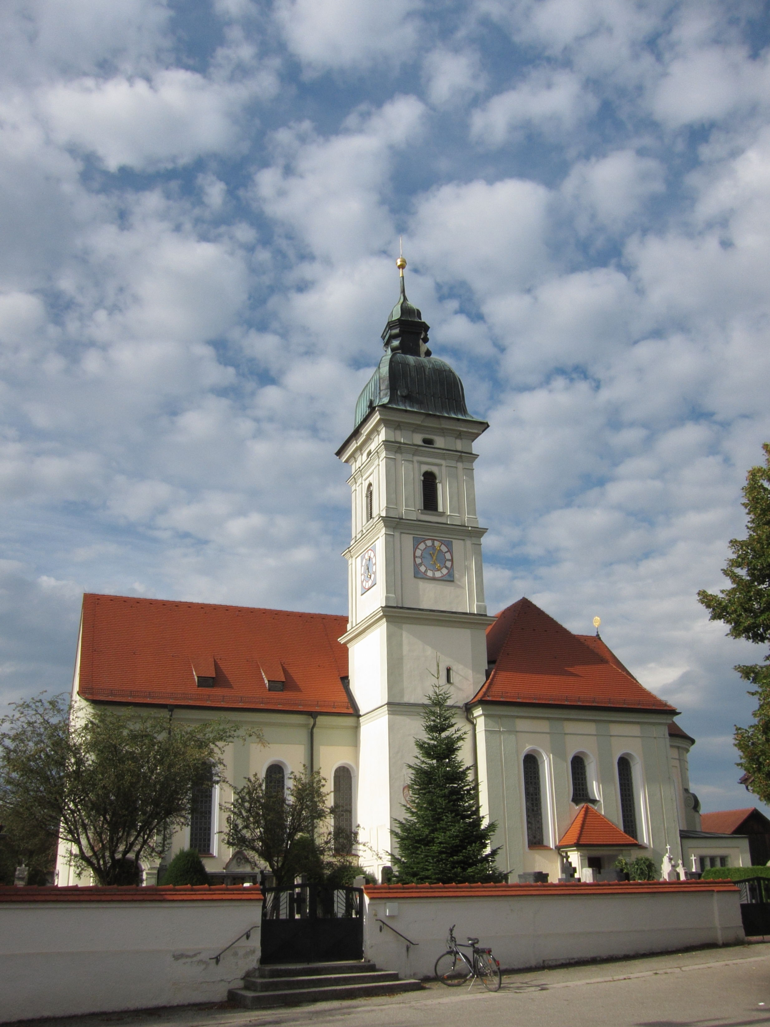 Reichenkirchen; katholische Pfarrkirche St. Michael, Saalkirche mit eingeschobenem Haubenturm im barocken Stil, spätgotischer Kern, 1666-90 barockisiert, Sakristei und Turm von Anton Kogler 1719-22; Vergrößerung des Langhauses durch Johann Baptist Lethner, 1753/9, Querhaus und Chor erneuert um 1920; mit Ausstattung.